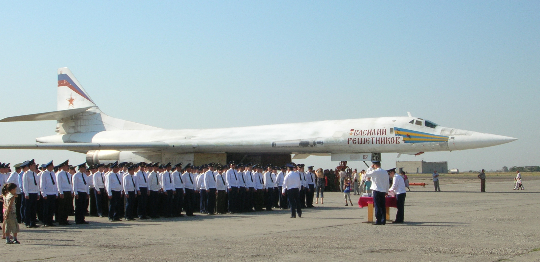 Стратегический ракетоносец Ту-160 «Василий Решетников» (б.н. 02) на авиабазе Энгельс.